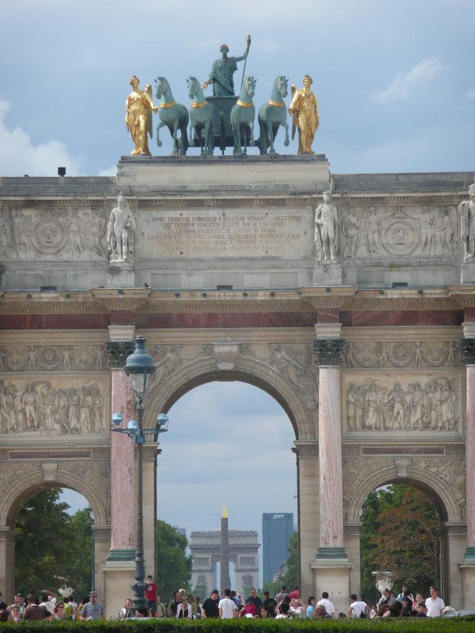 Arc de triomphe du Carrousel, Paris. Derrière, l'obélisque de Louxor (place de la Concorde) et très loin, l'arc de triomphe de l'Étoile.